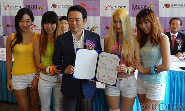 IEF 2012 중국 무한시 개최기념 한국 기자간담회